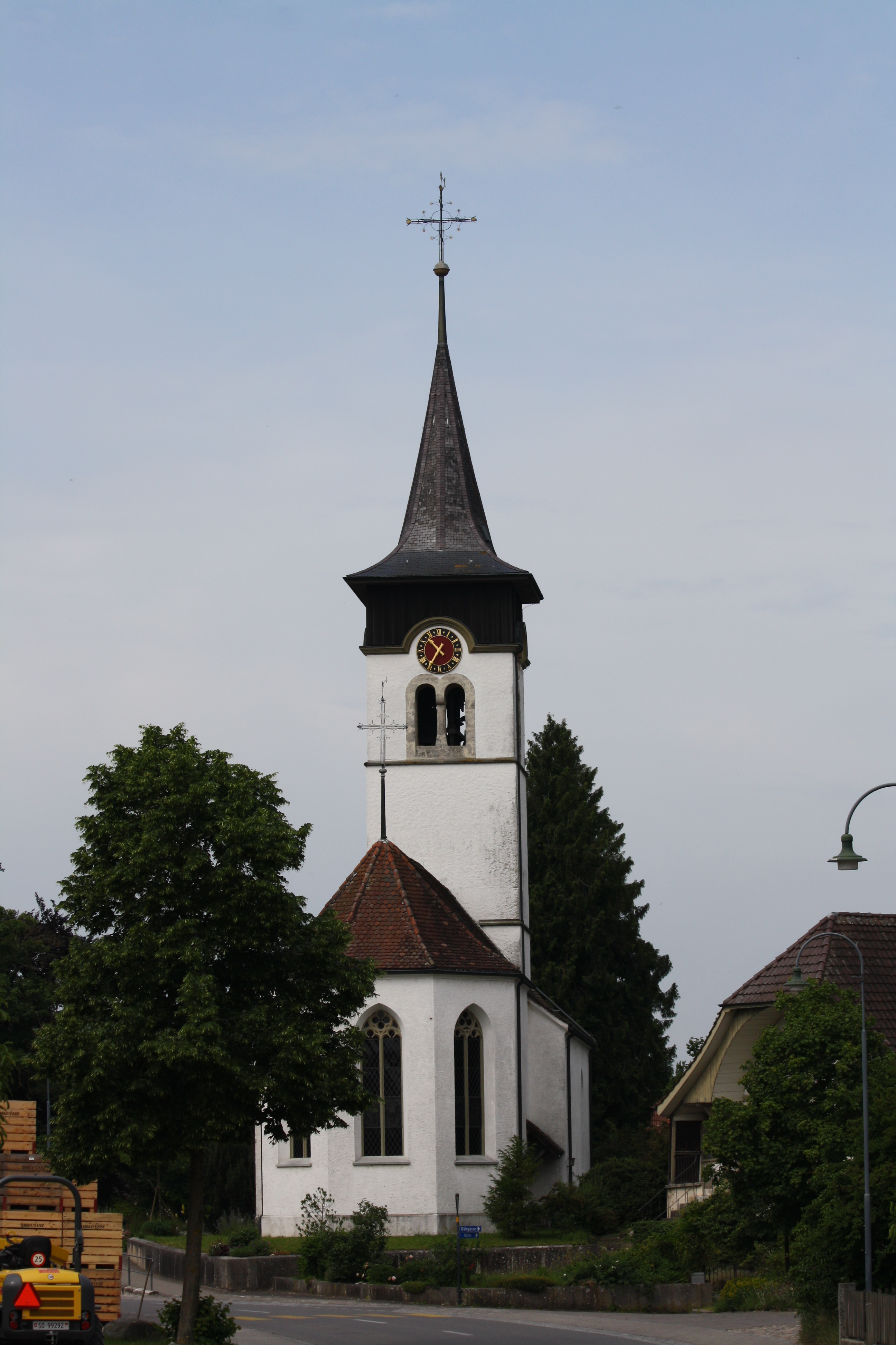 Kirche Grossaffoltern